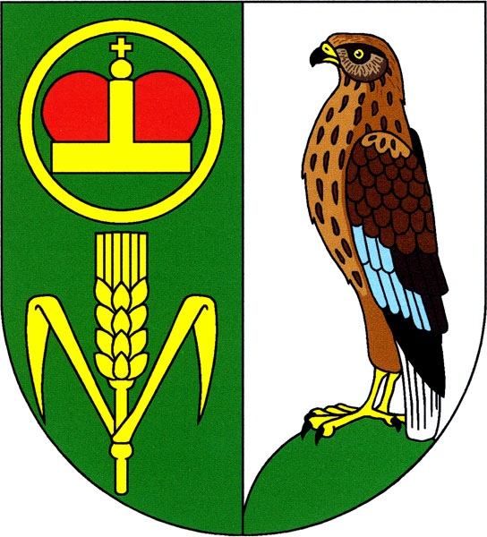 Znak obce Třebětice (okres Jindřichův Hradec)